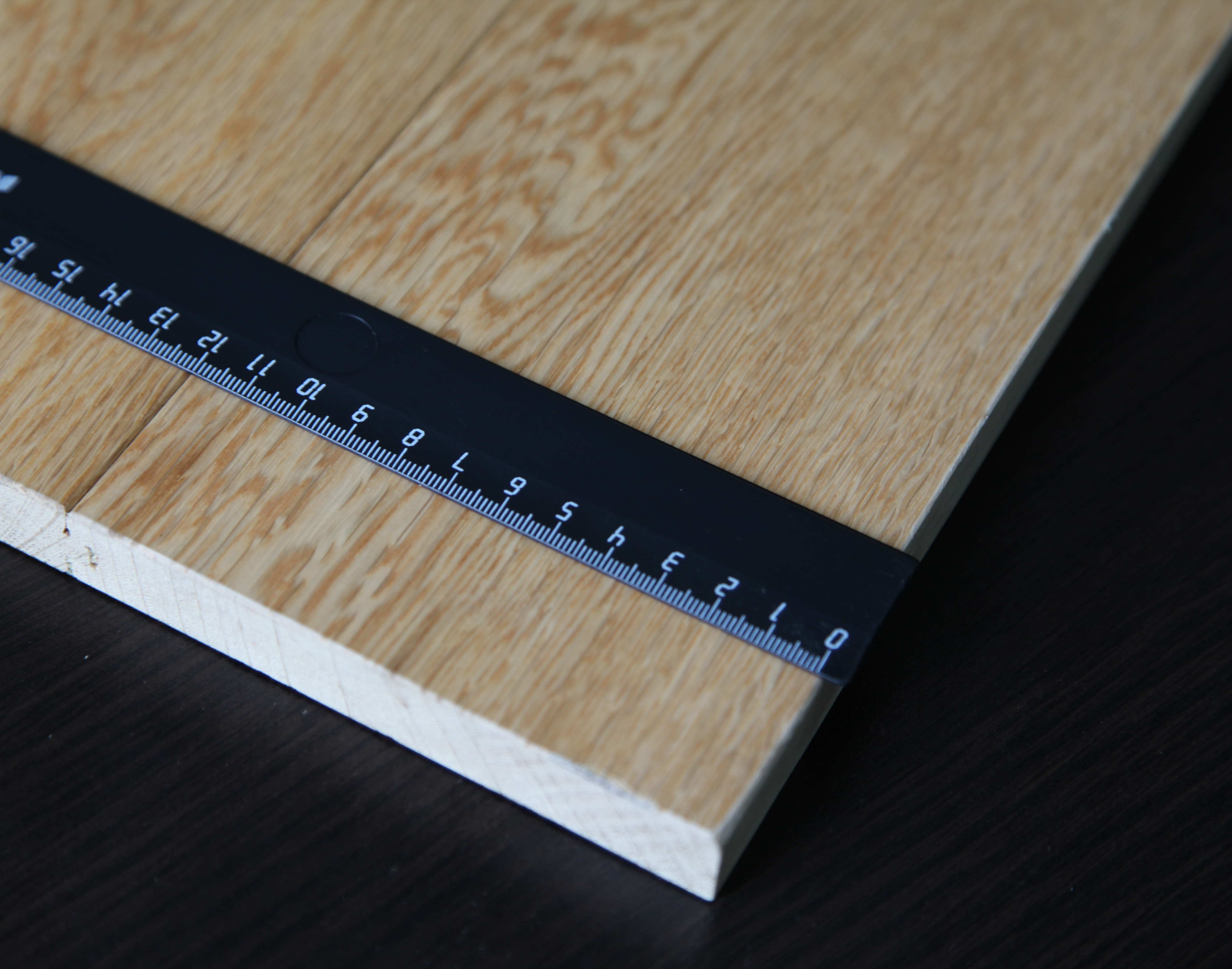 Массивная доска. Демонстрация ширины 122 мм, соединительный профиль срезан.